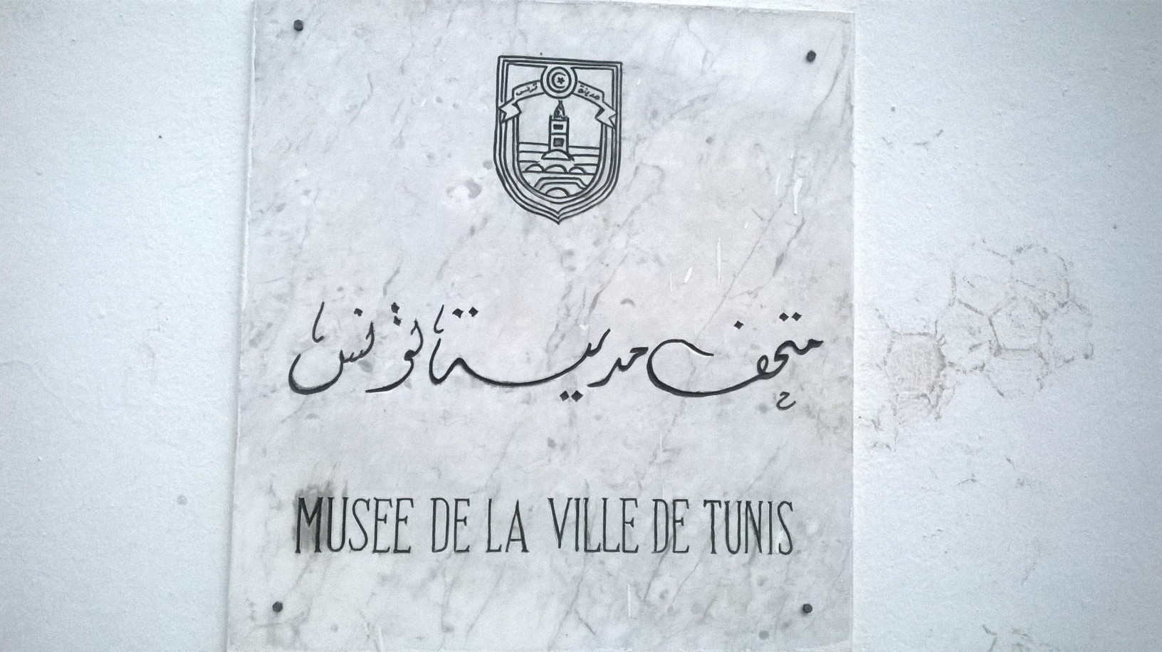 Palais Kheireddine, la médina de Tunis مدينة تونس العتيقة